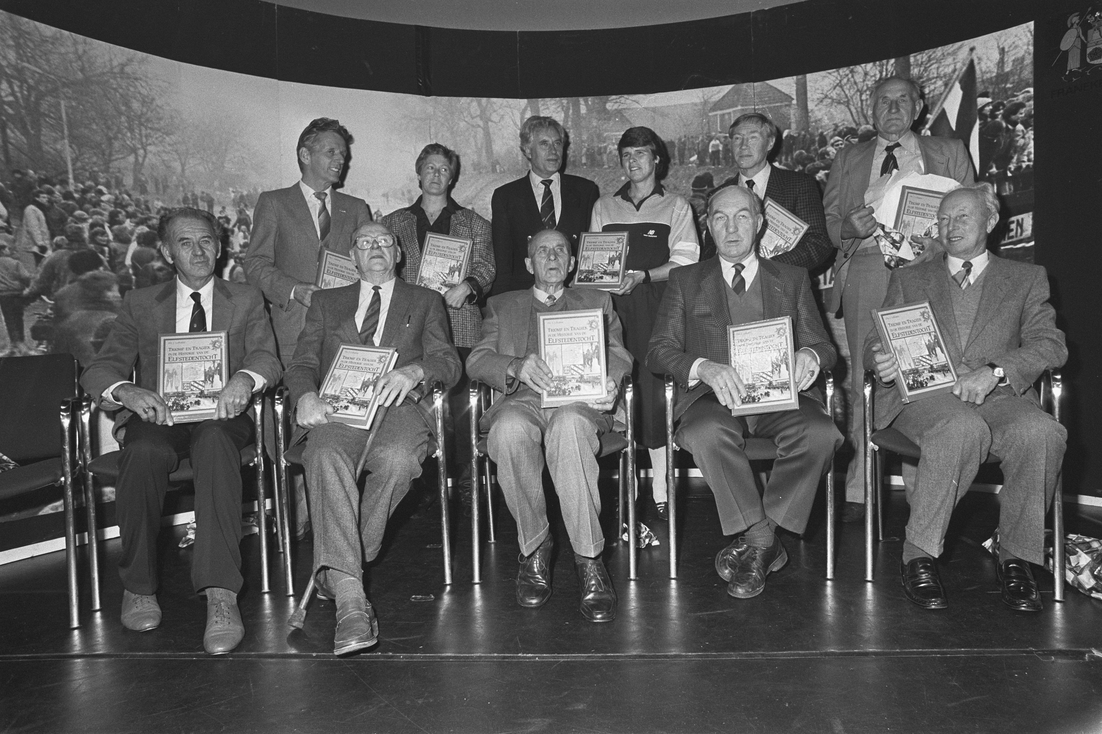 Collectie / Archief : Fotocollectie Anefo Reportage / Serie : [ onbekend ] Beschrijving : Elfstedentochtwinnaars aanwezig bij presentatie boek over Elfstedentocht in Franeker. Staand v.l.n.r.: Jeen van den Berg, Atje Keulen-Deelstra, Jan Sipkema, Lenie van der Hoorn-Langelaan, Reinier Paping, Abe de Vries. Zittend v.l.n.r. (waarschijnlijk): Jan van der Hoorn, Durk van der Duim, Sjouke Westra, Piet Keijzer en Sipke Castelein. Boek: Johannes Lolkama: Triomf en tragiek in de historie van de Elfstedentocht Datum : 4 november 1986 Locatie : Franeker Trefwoorden : boeken, presentaties, schaatsen Persoonsnaam : Castelijn, Duim V.D., Hoor V.D., Keijzer Instellingsnaam : Elfstedentocht Fotograaf : Bogaerts, Rob / Anefo Auteursrechthebbende : Nationaal Archief Materiaalsoort : Negatief (zwart/wit) Nummer archiefinventaris : bekijk toegang 2.24.01.05 Bestanddeelnummer : 933-8048